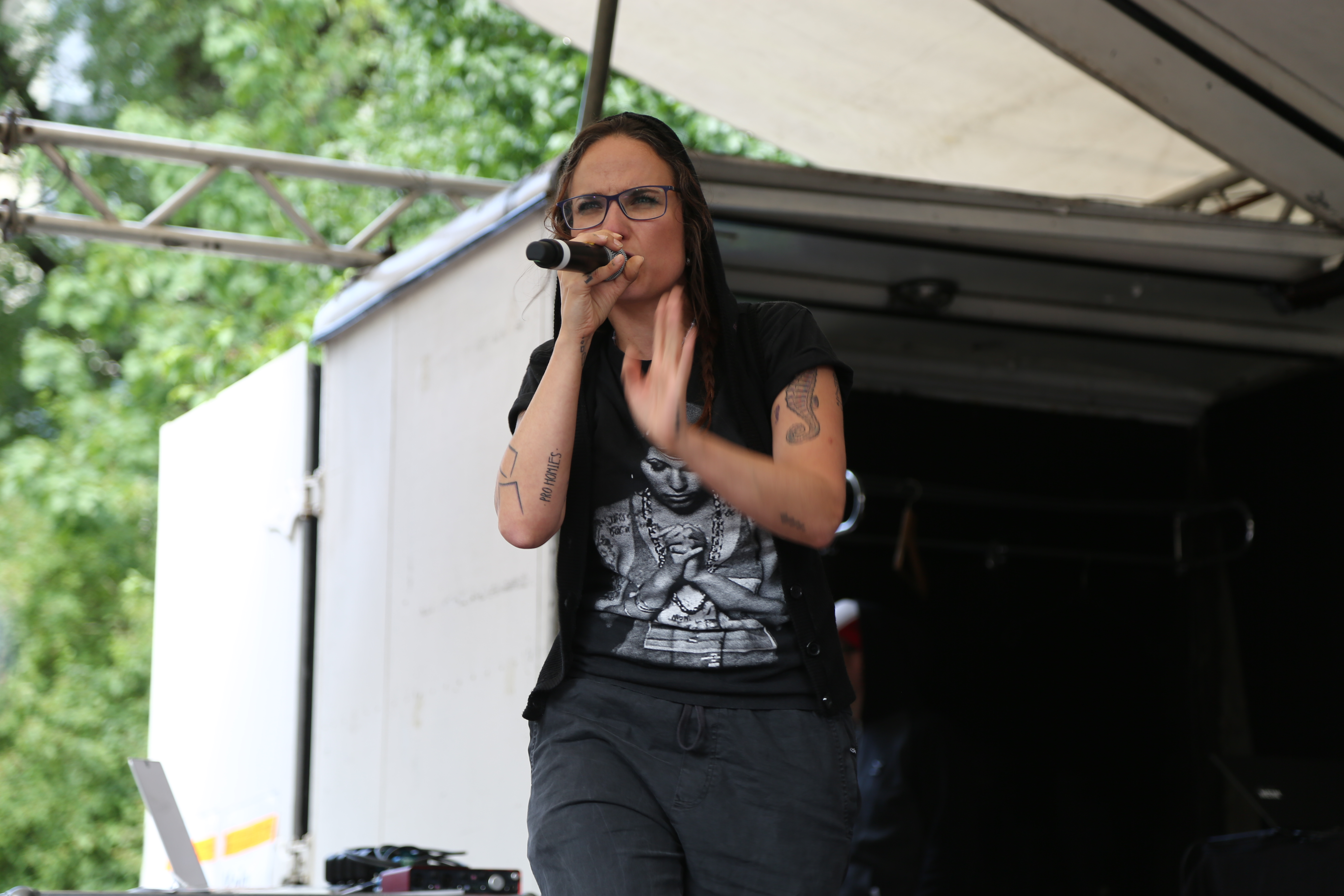 Sookee auf der "Kein Schlussstrich"-Demo zur Urteilsverkündung im NSU-Prozess am 11. Juli 2018 in München